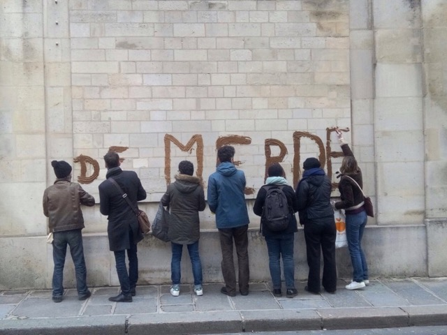 Tag sur la facade du secrétariat d'état pour la cohésion sociale